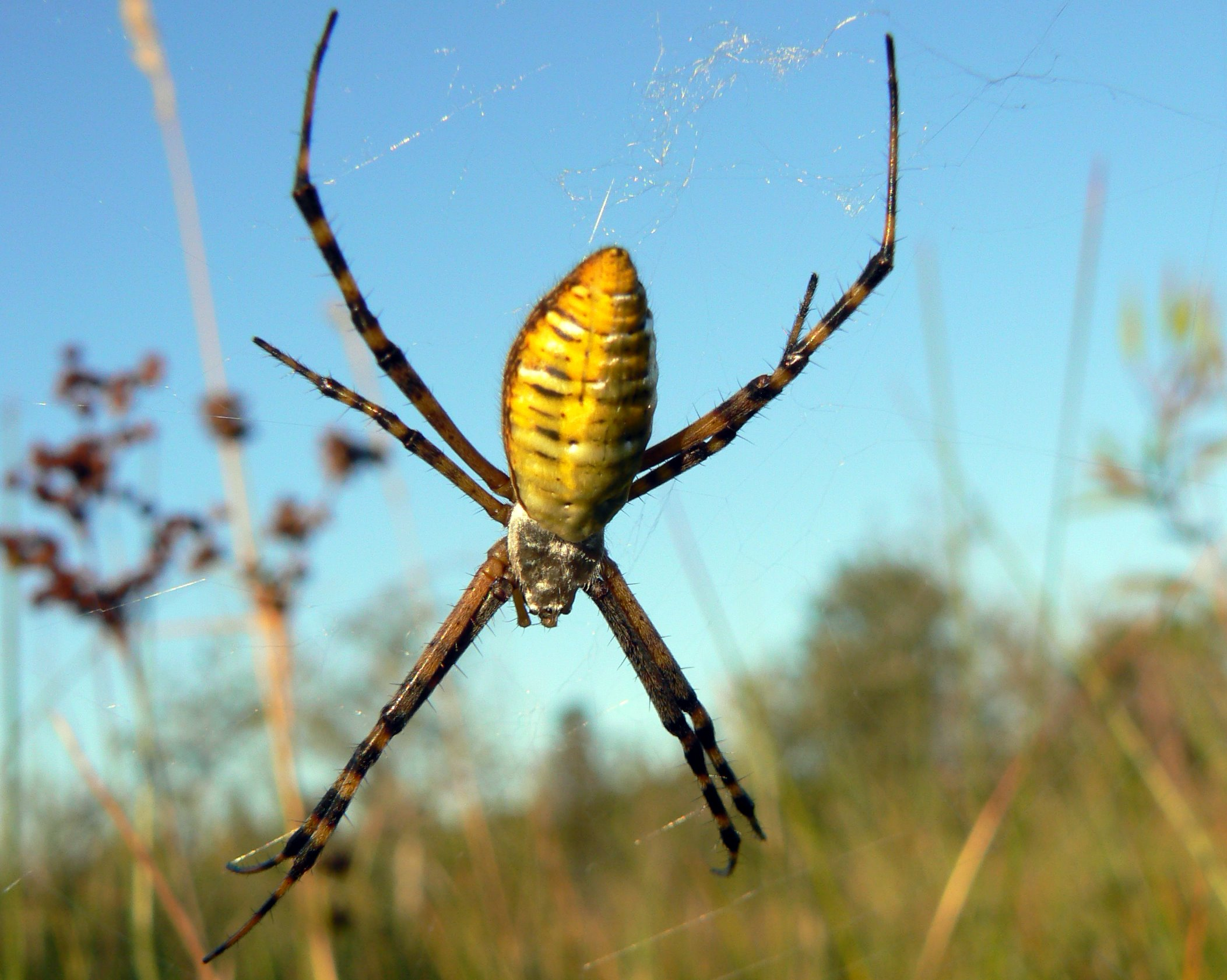 Banded Argiope (Argiope trifasciata)